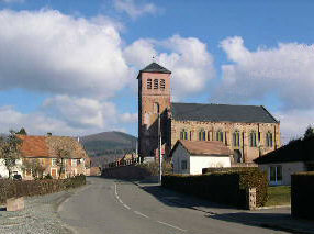 Village d'Etueffont dans le Territoire de Belfort. Eglise paroissiale Saint-Valbert.